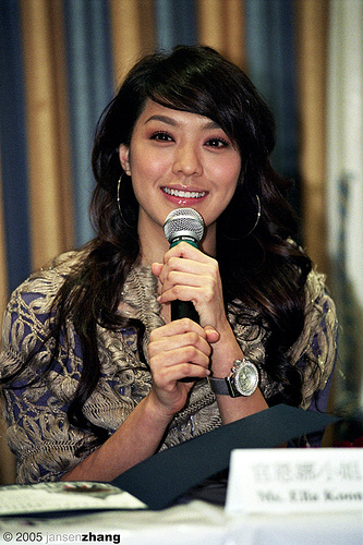 Ella Koon